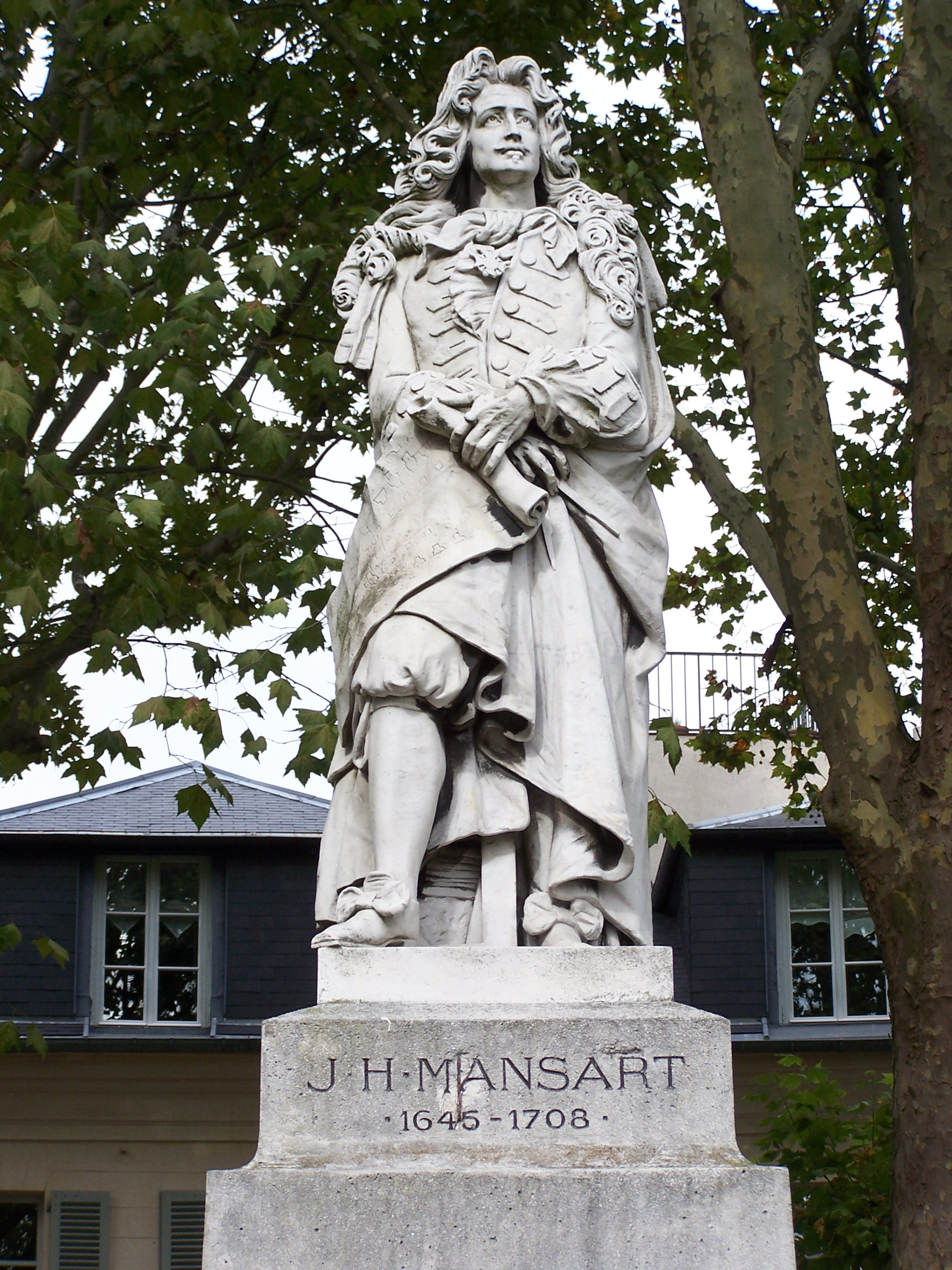 Statue de Mansart à Versailles (Yvelines, France)